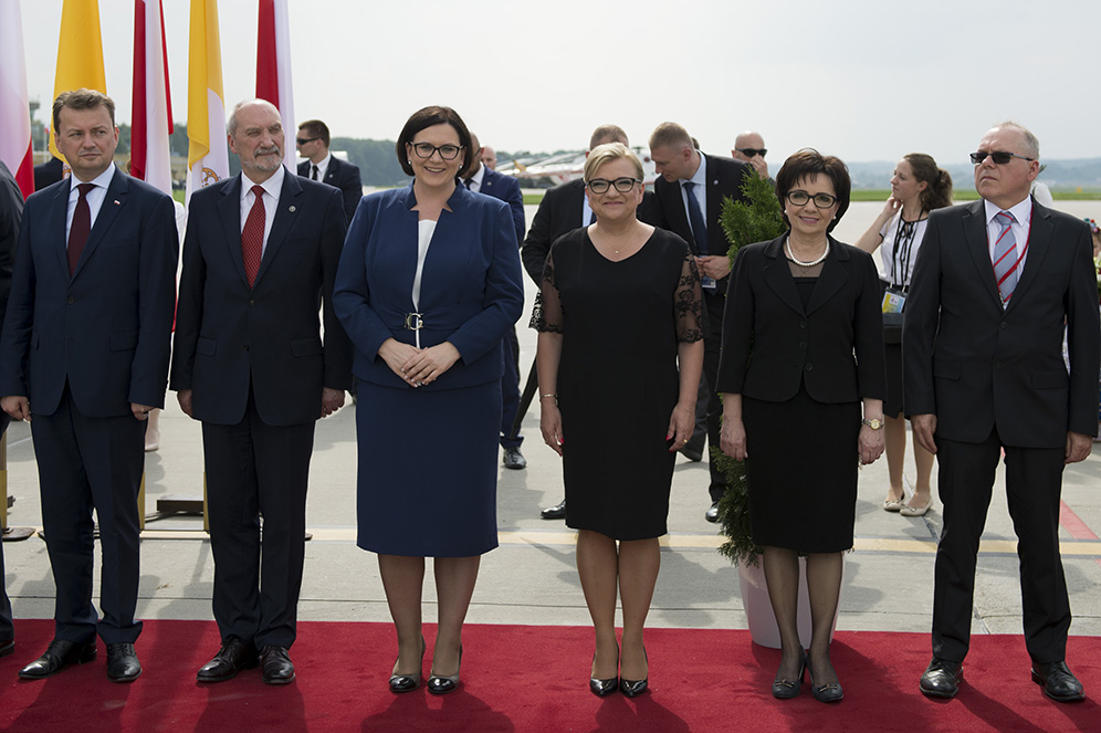 27.07.2016, Kraków | Światowe Dni Młodzieży: premier Szydło przywitała papieża Franciszka oraz spotkała się z pielgrzymami. fot. P.Tracz/KPRM